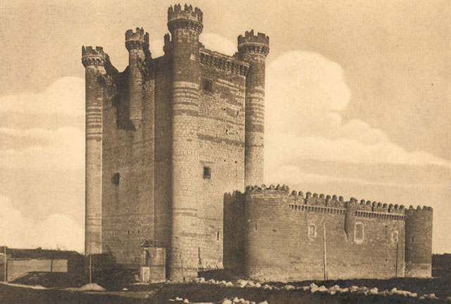 Castillo - Fuensaldaña (Valladolid) - Heliotipia Artística Española. Recuerdos Artísticos e Históricos de la Provincia. Fotos Gilardi. Castillo que fue de los Viveros, confidentes amigos de los Reyes Católicos. Lo más importante de la fortaleza es de la décimaquinta centuria. - Impresión. Papel 170 x 115 Sepia